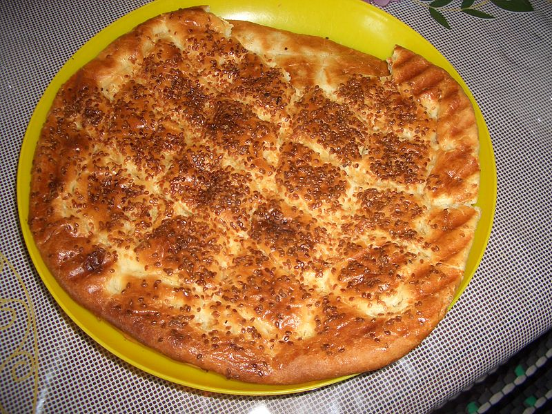 Türkiye'nin Sivas iline özgü Sivas Çöreği.